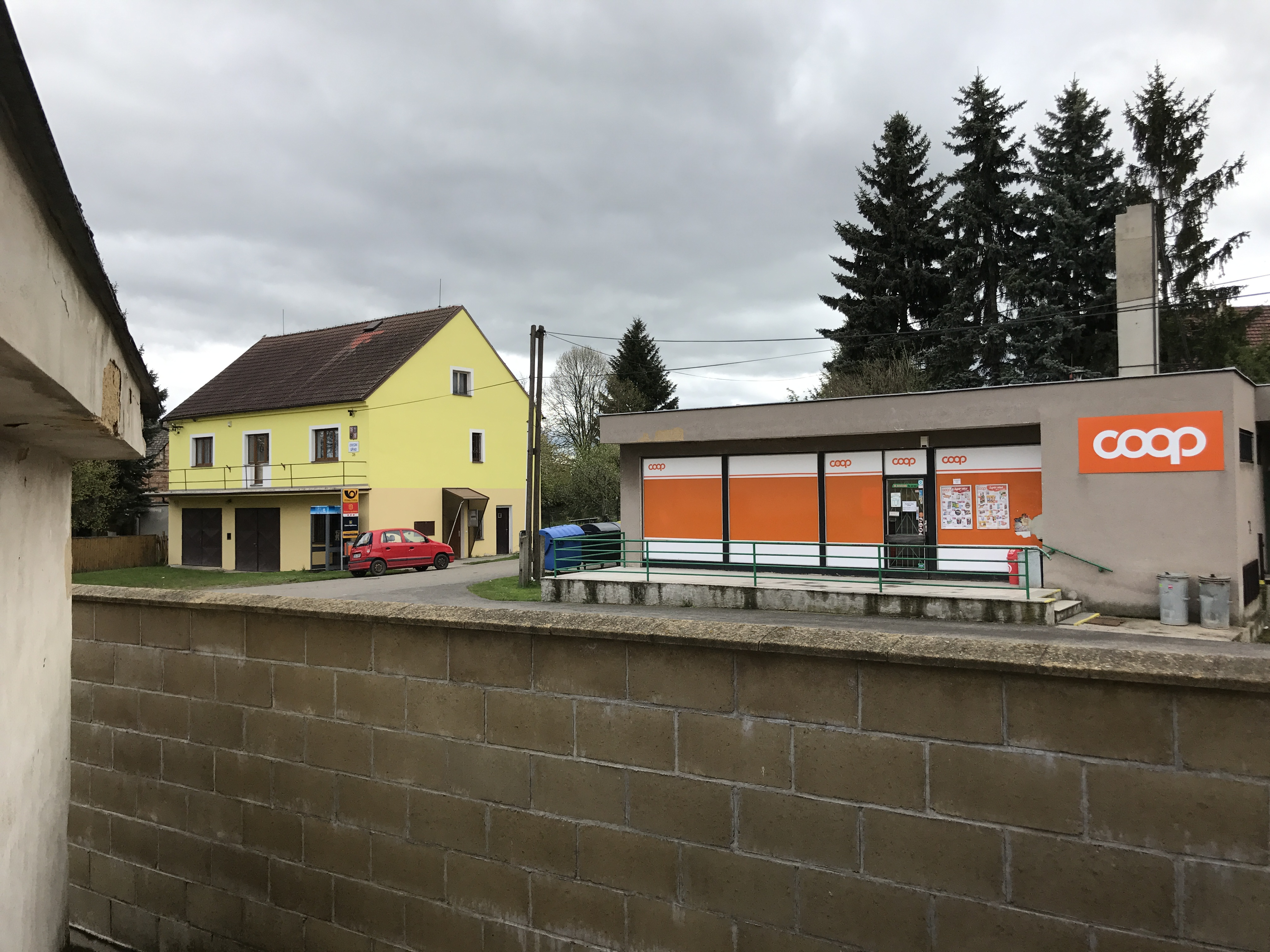 Örtlicher Einkaufsladen & Post